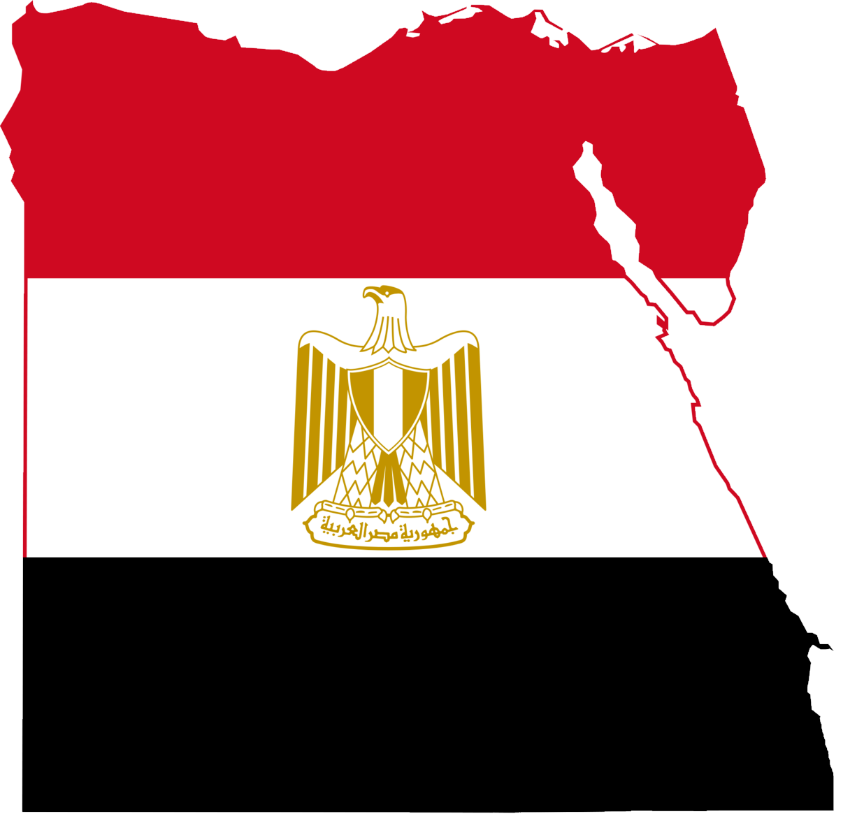 خريطة-علم مصر